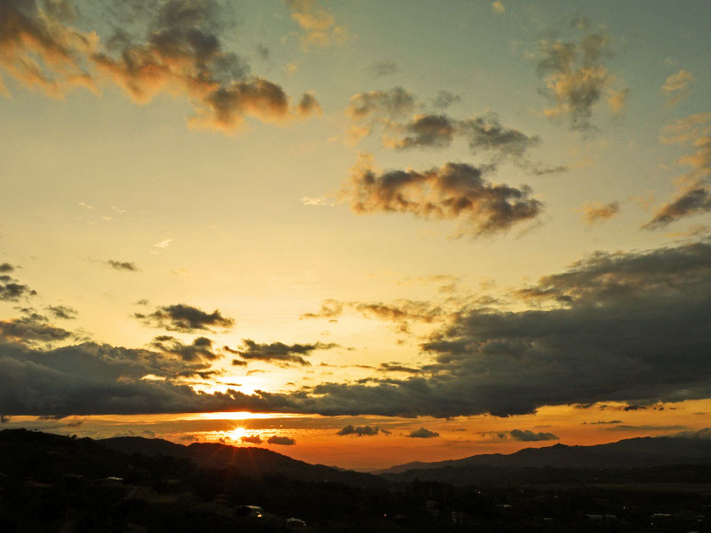 Taken from Piedades, Santa Ana, Costa Rica.